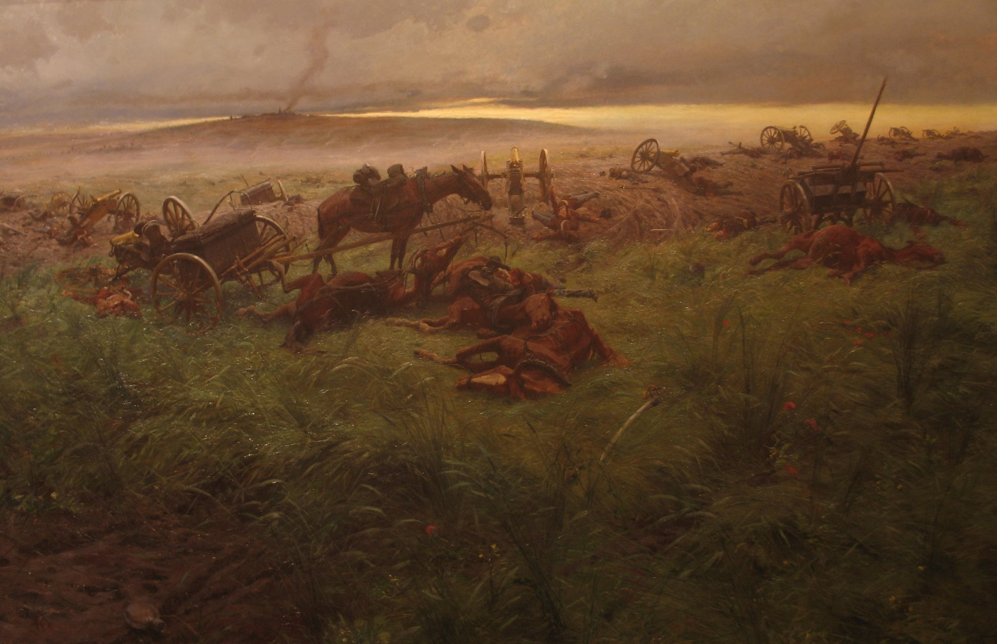 Die Armeegeschützreserve nach der Schlacht bei Königgrätz am 3. Juli 1866